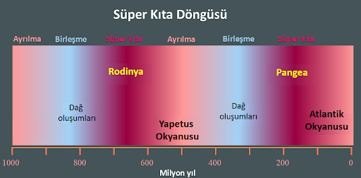 döngüyü anlatan görsel